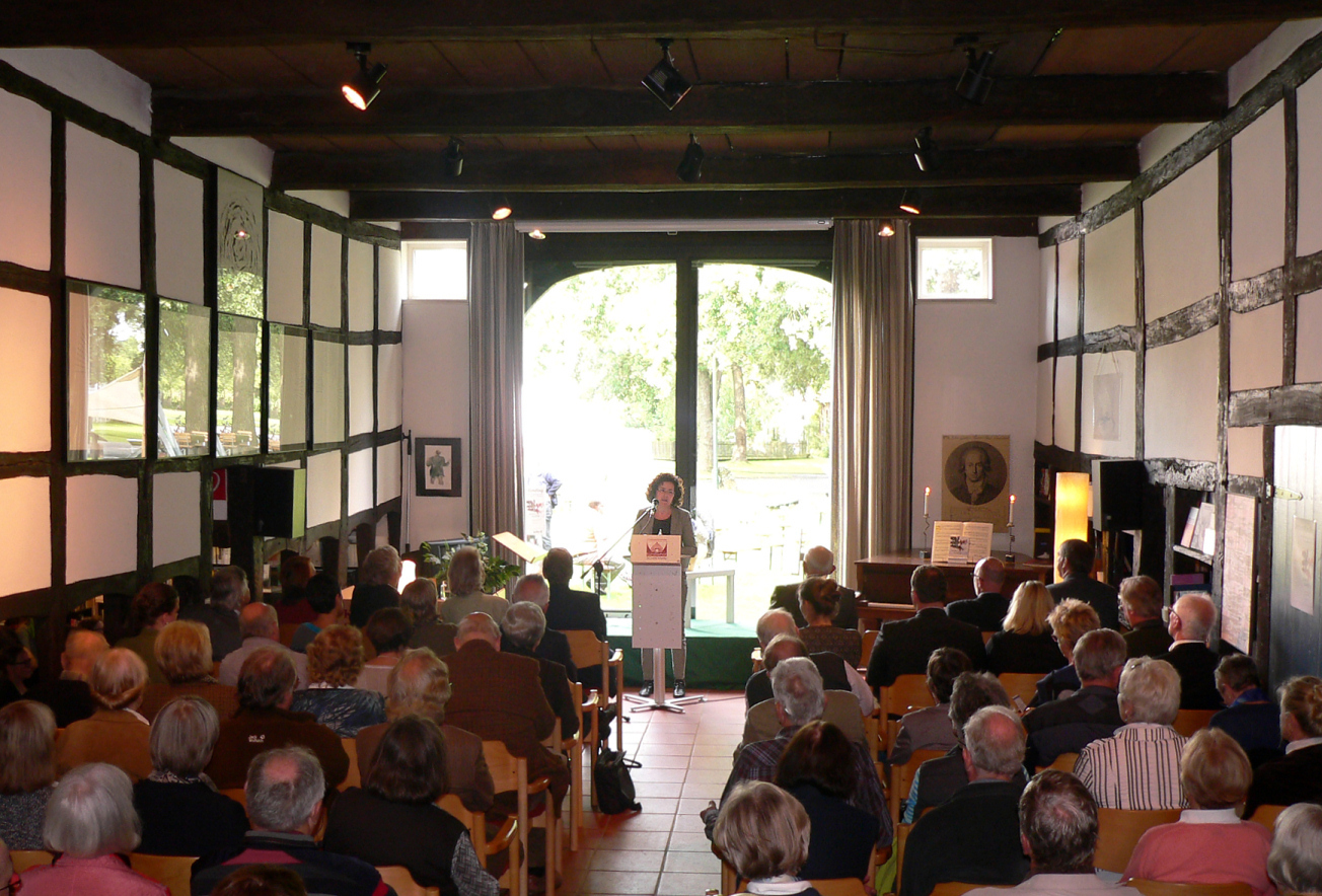 Künstlerhof Schreyahn bei der Eröffnung des Denkmaltages 2015